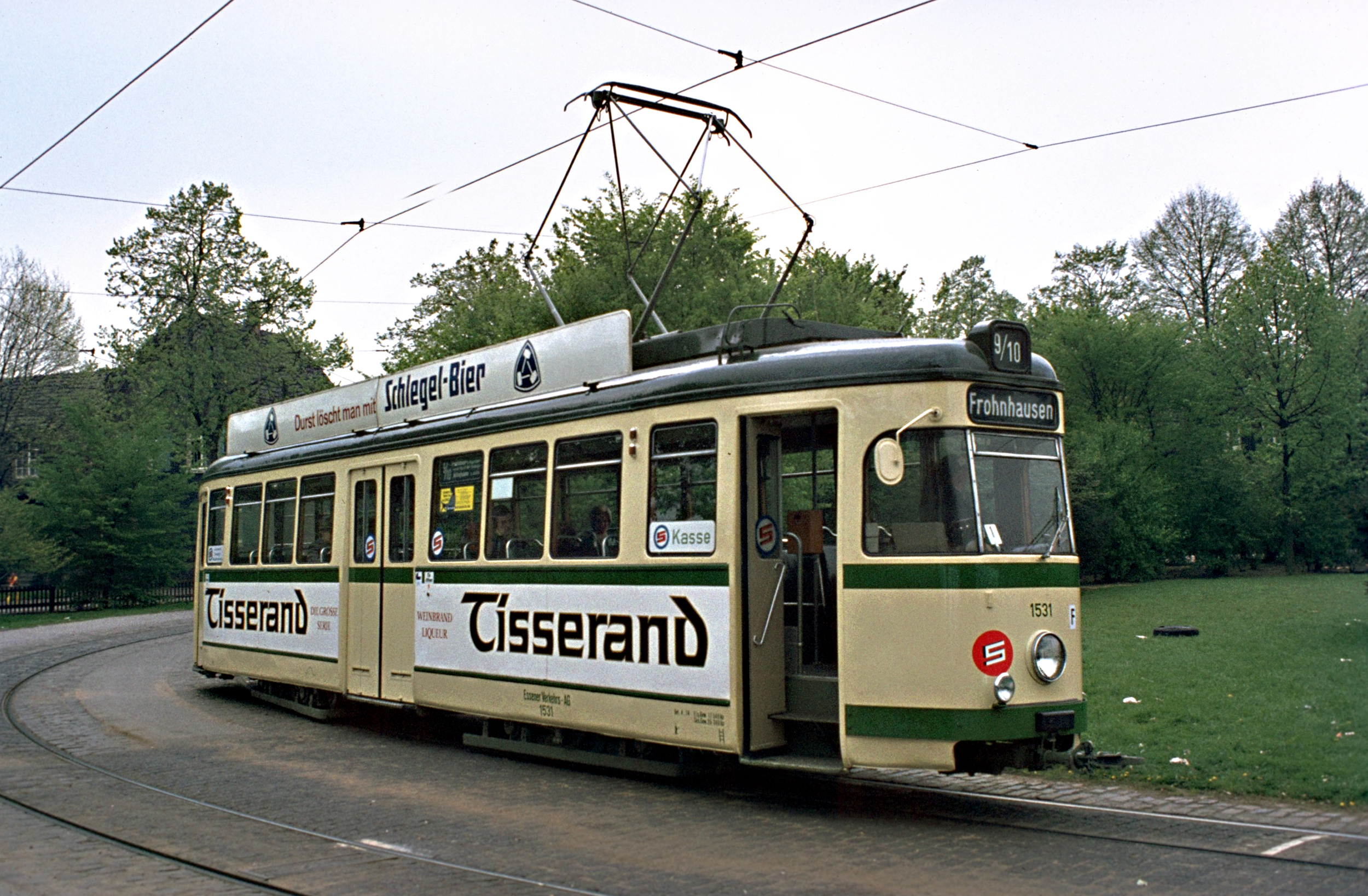 Grossraumwagen in Essen Rellinghausen